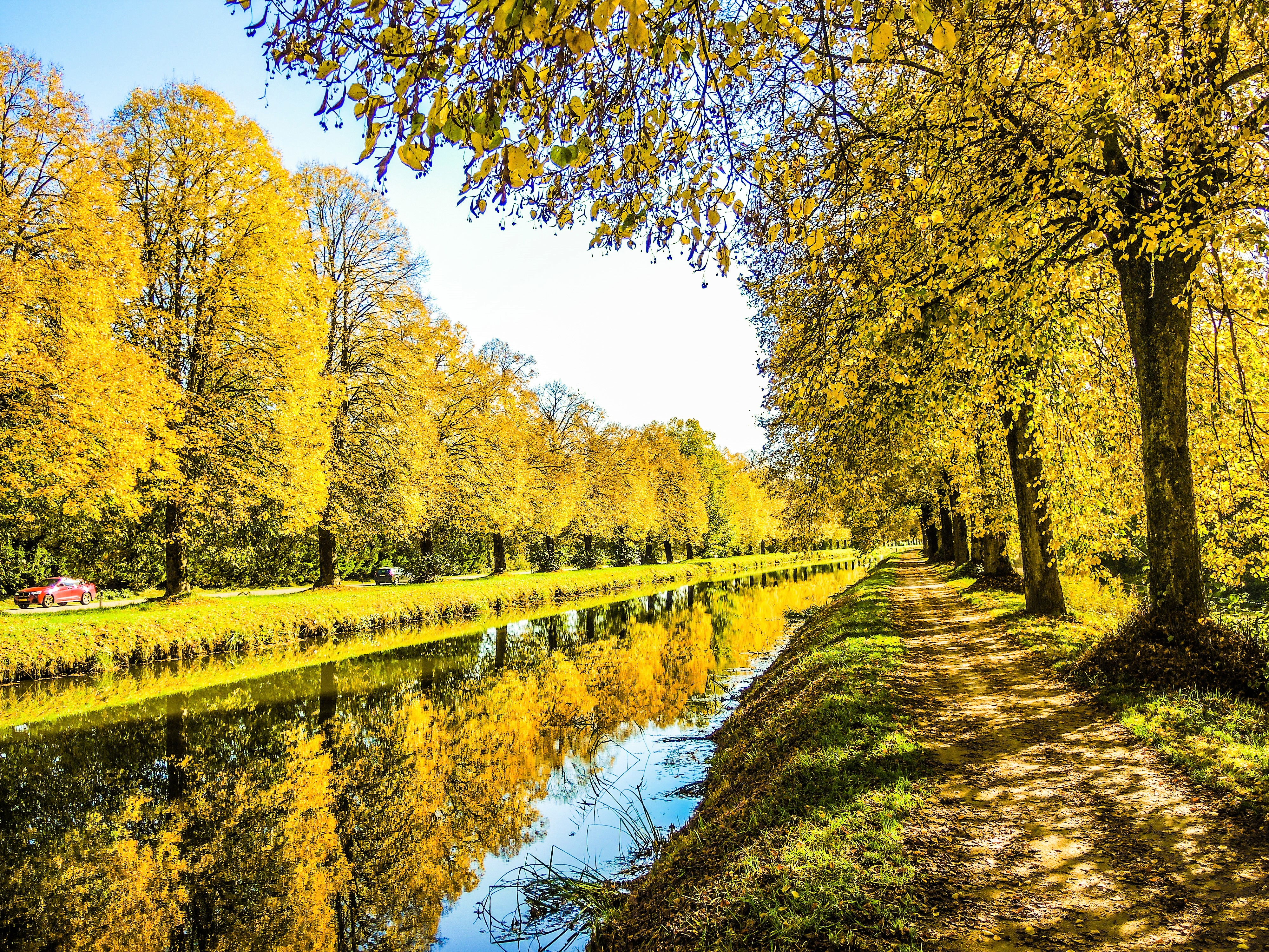 Canal de la Haute-Saône et piste cyclable nommée coulée verte reliant Belfort à Montbéliard. Vue prise un peu en aval du port de Botans. Territoire de Belfort.